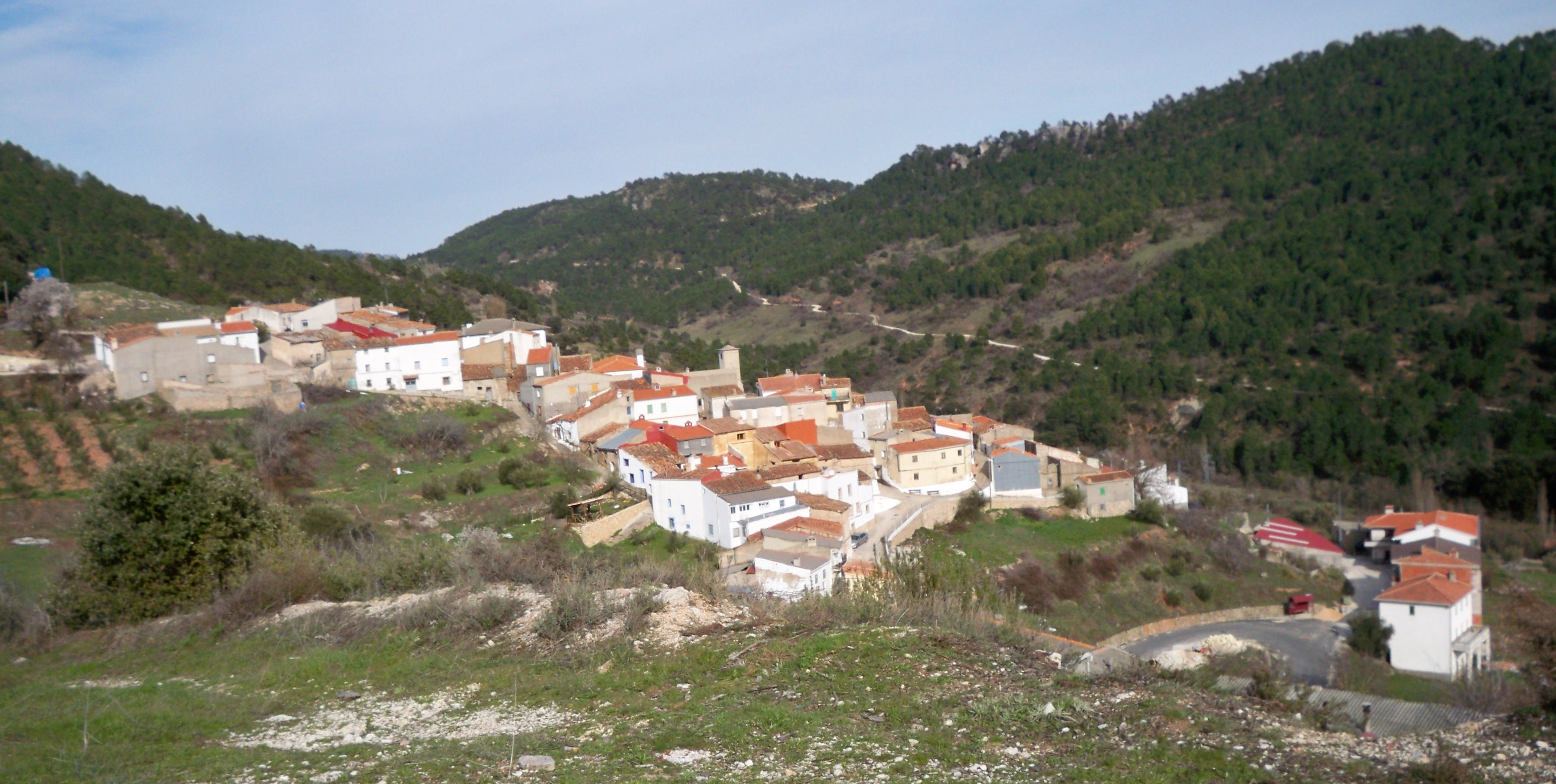 Vista de La Cañada del Provencio desde la carretera de Vegallera (Molinicos - Albacete)